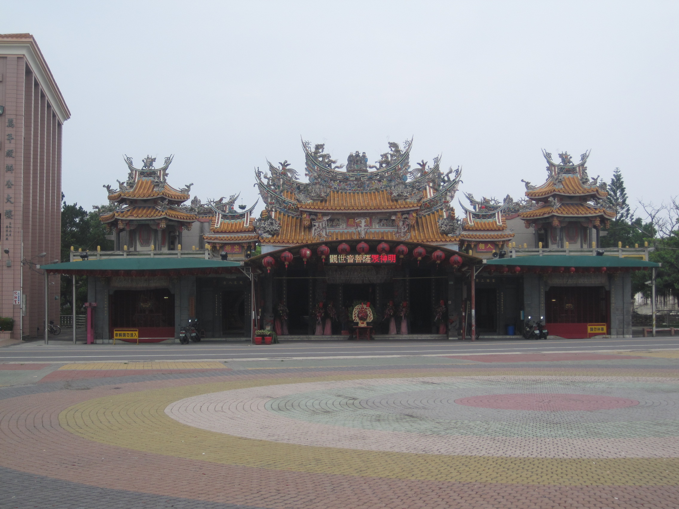 臺南市南區的灣裡萬年殿